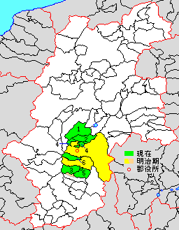 長野県上伊那郡の位置